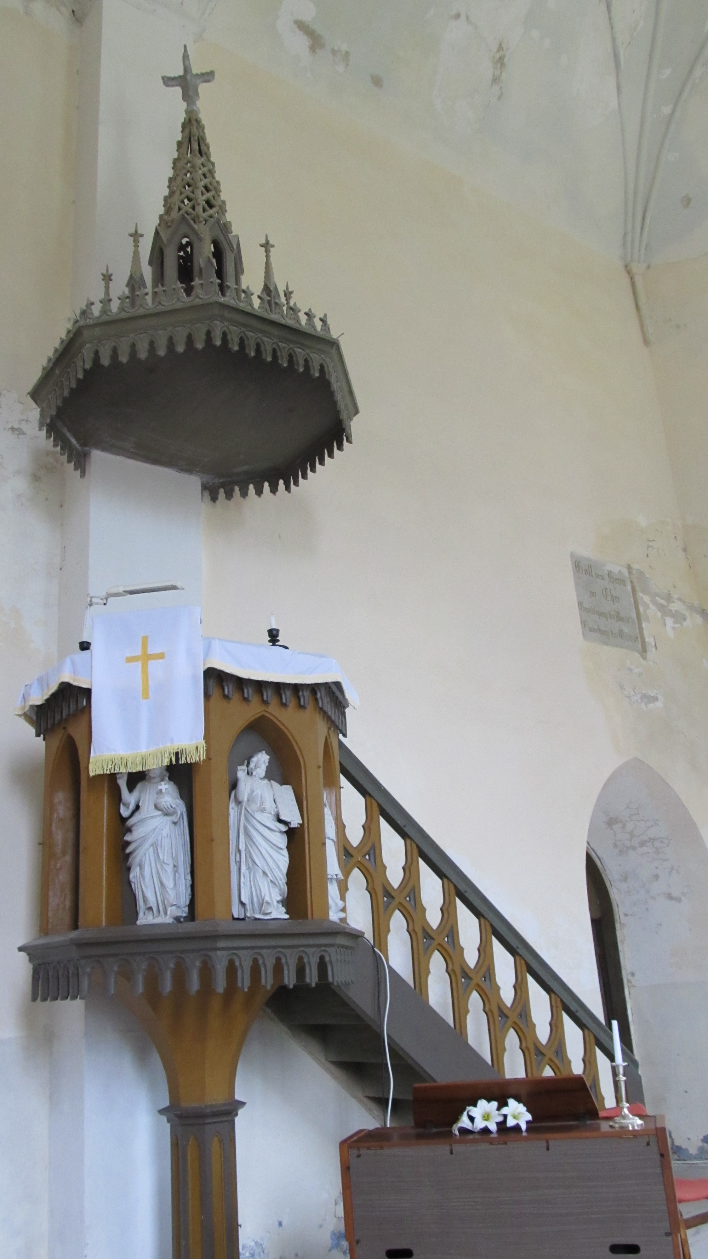 Lihula kiriku kantsel